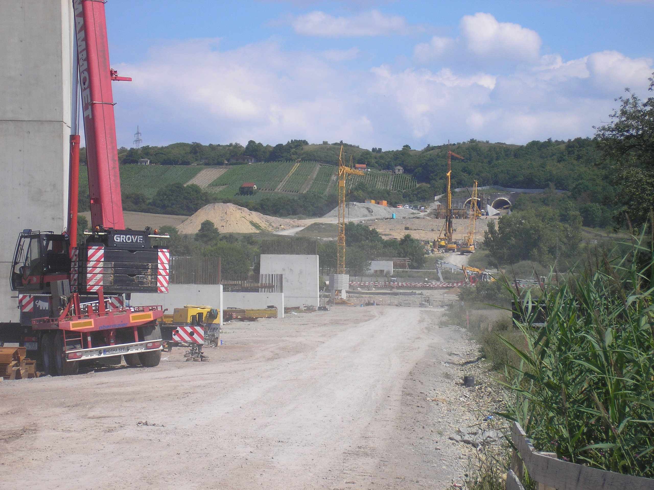 Das Südportal des Osterbergtunnels bei Karsdorf (Sachsen-Anhalt).